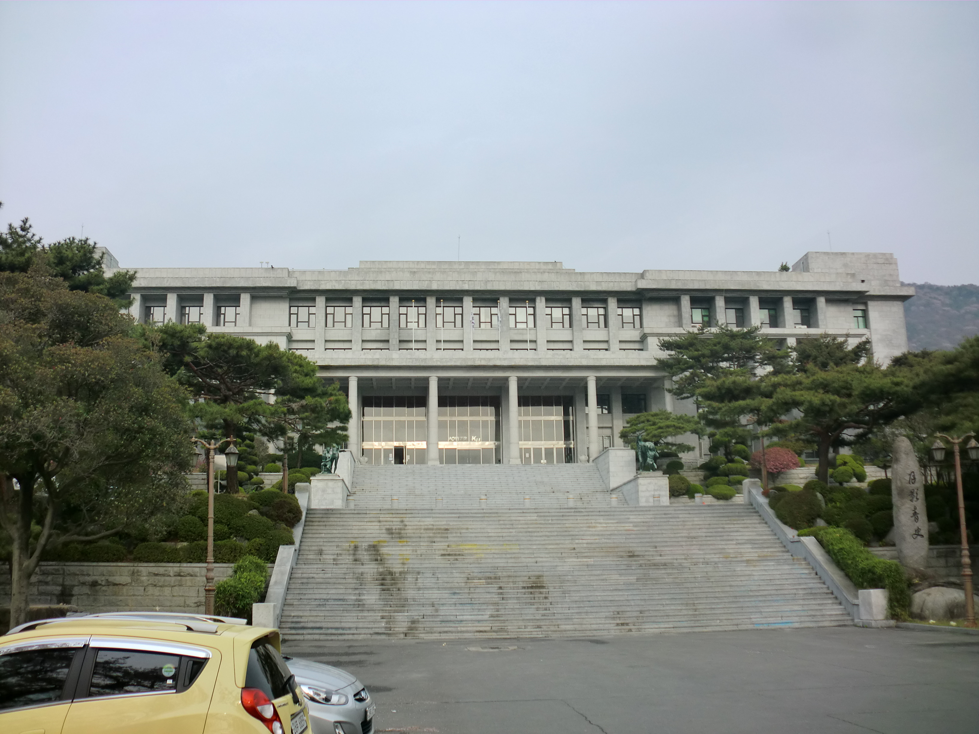 경남대학교